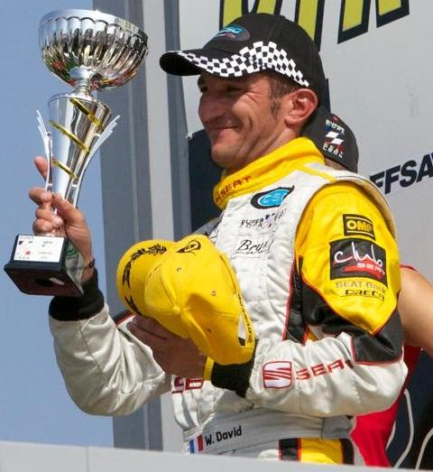 William David podium Ledenon 2010